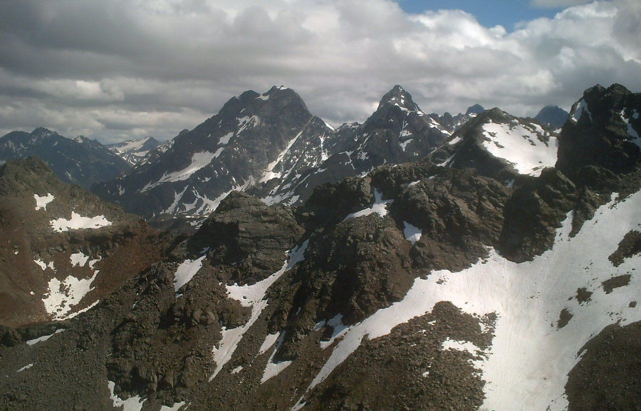 Saxuirer Feuerkogel, Kaunergrat, Ötztaler Alpen